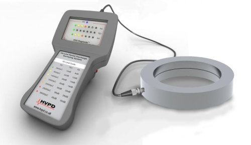 Прибор HVPD PDS Rogowski для предварительной диагностики (методом измерения частичных разрядов) электрооборудования и вращающихся машин (двигателей и генераторов)